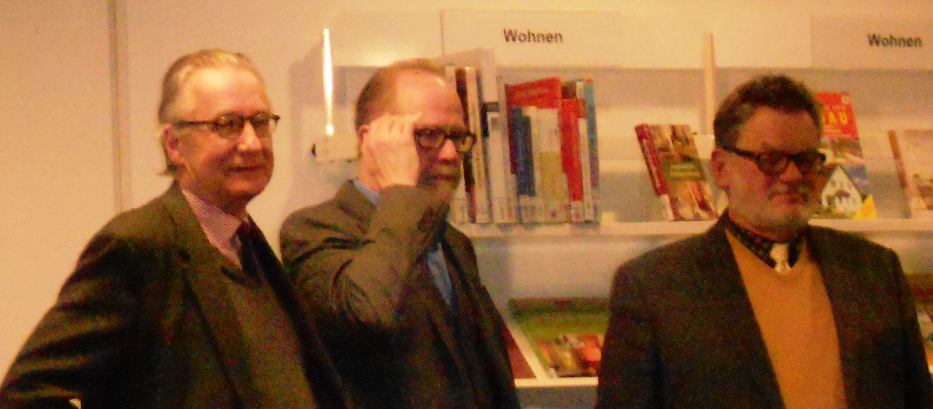 Joachim Kersten, Jan Philipp Reemtsma und Bernd Rauschenbach bei einer Lesung in der Bücherhalle Harburg